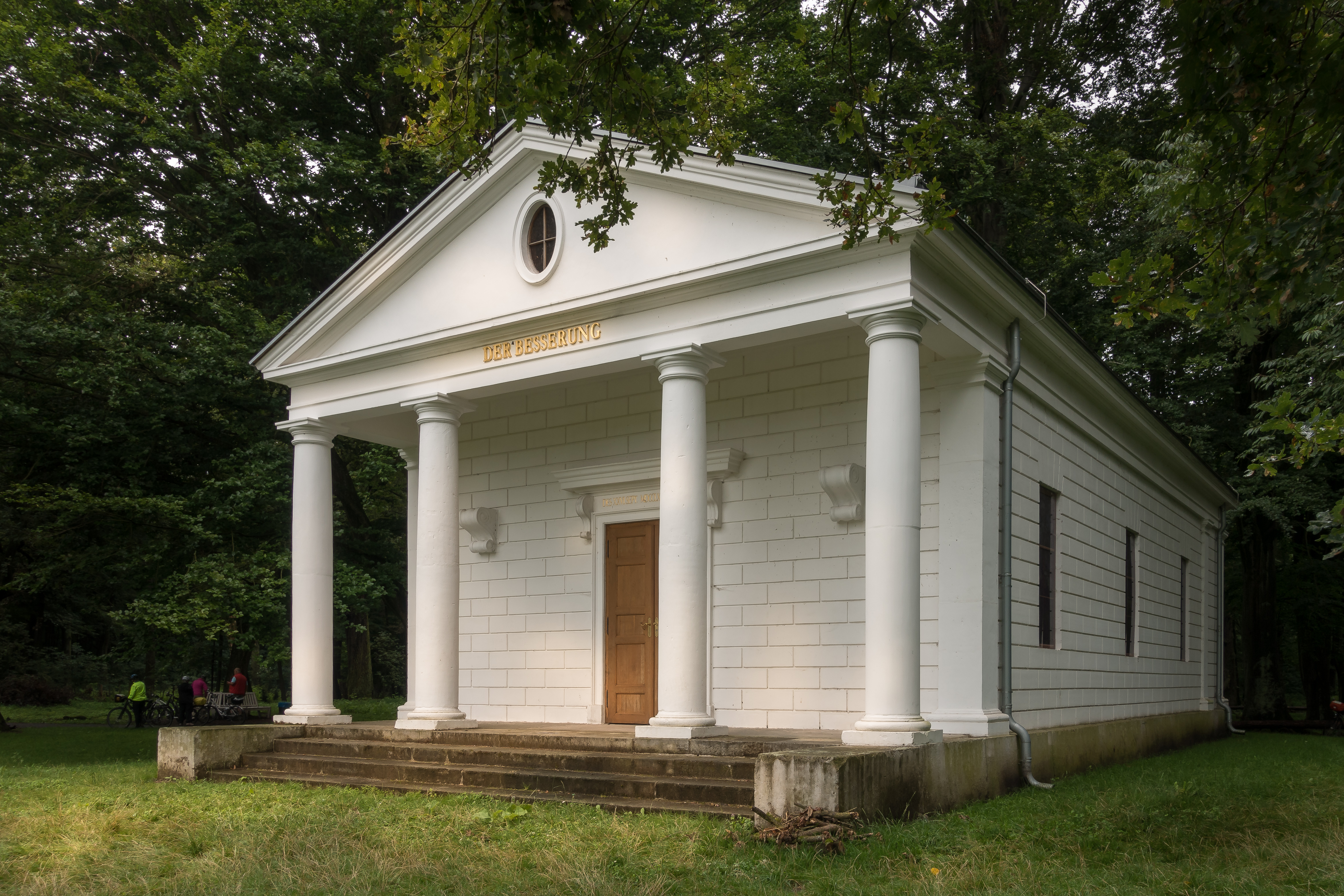 Die Solitüde: Wiederaufbau (ab 2009) des kleinen klassizistischen Gebäudes in Form eines römischen Tempels. Es diente als Heilbad für den Fürsten. Das Wasser für die warmen Bäder bezog man über ein Röhrensystem aus dem nahe gelegenen Küchengebäude.